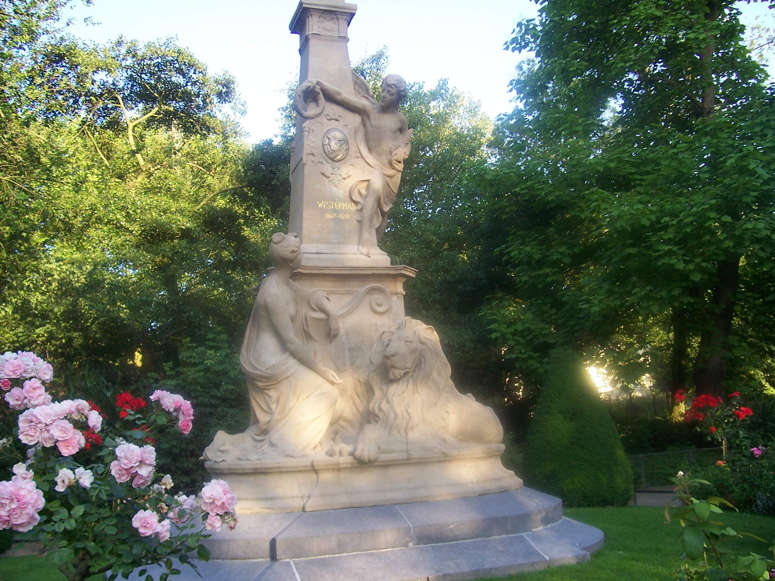 Monument voor G.F. Westerman, door Bart te Hove, 1891, Artis, Amsterdam